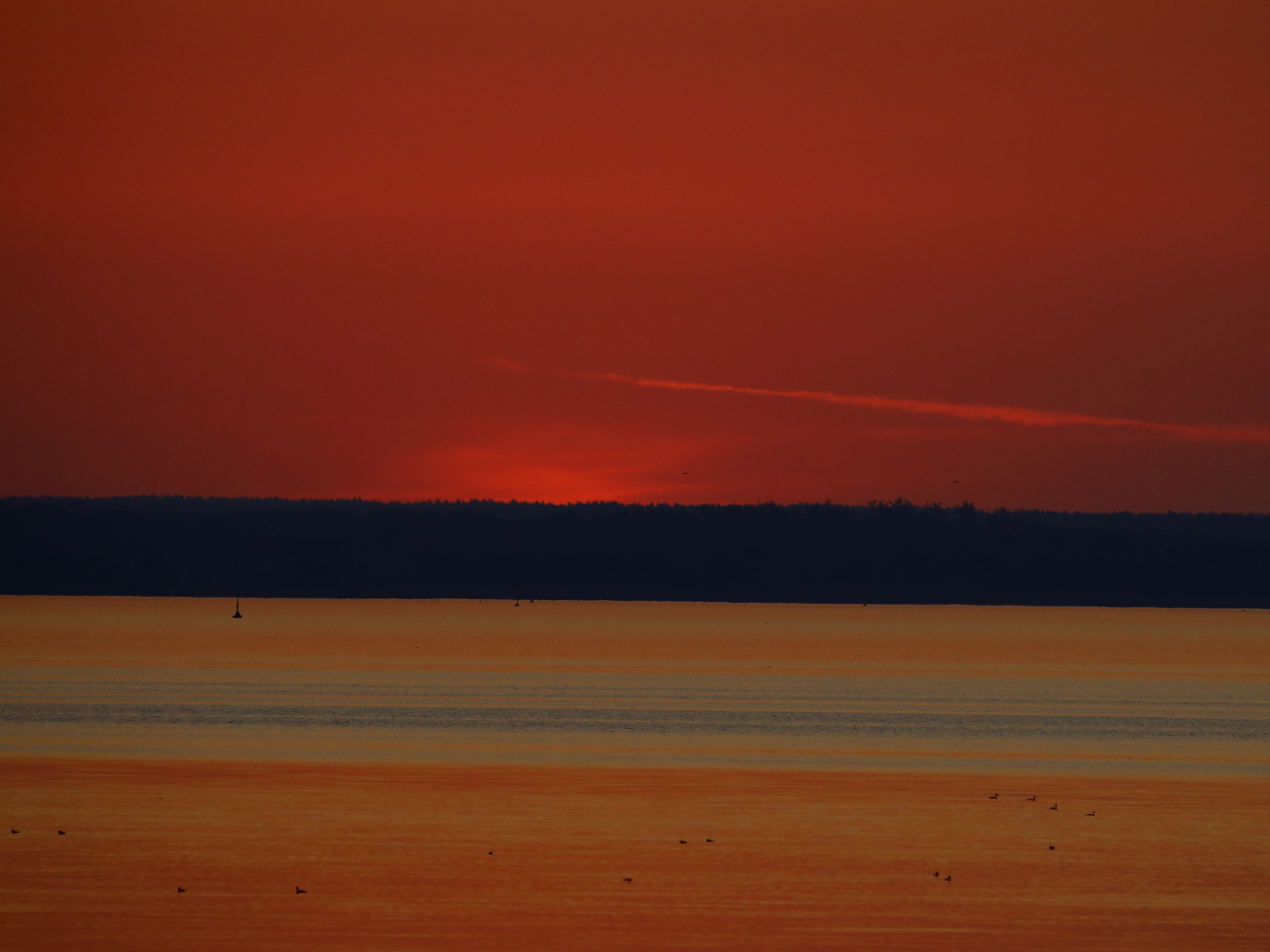 Morgenröte über der Müritz.